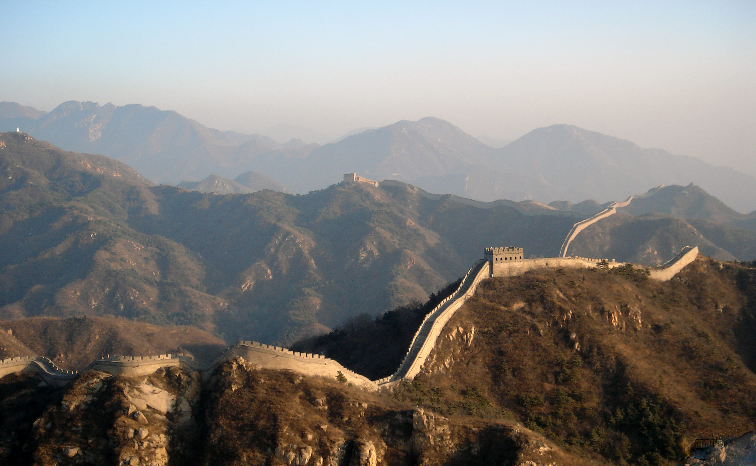 Chinesische Mauer